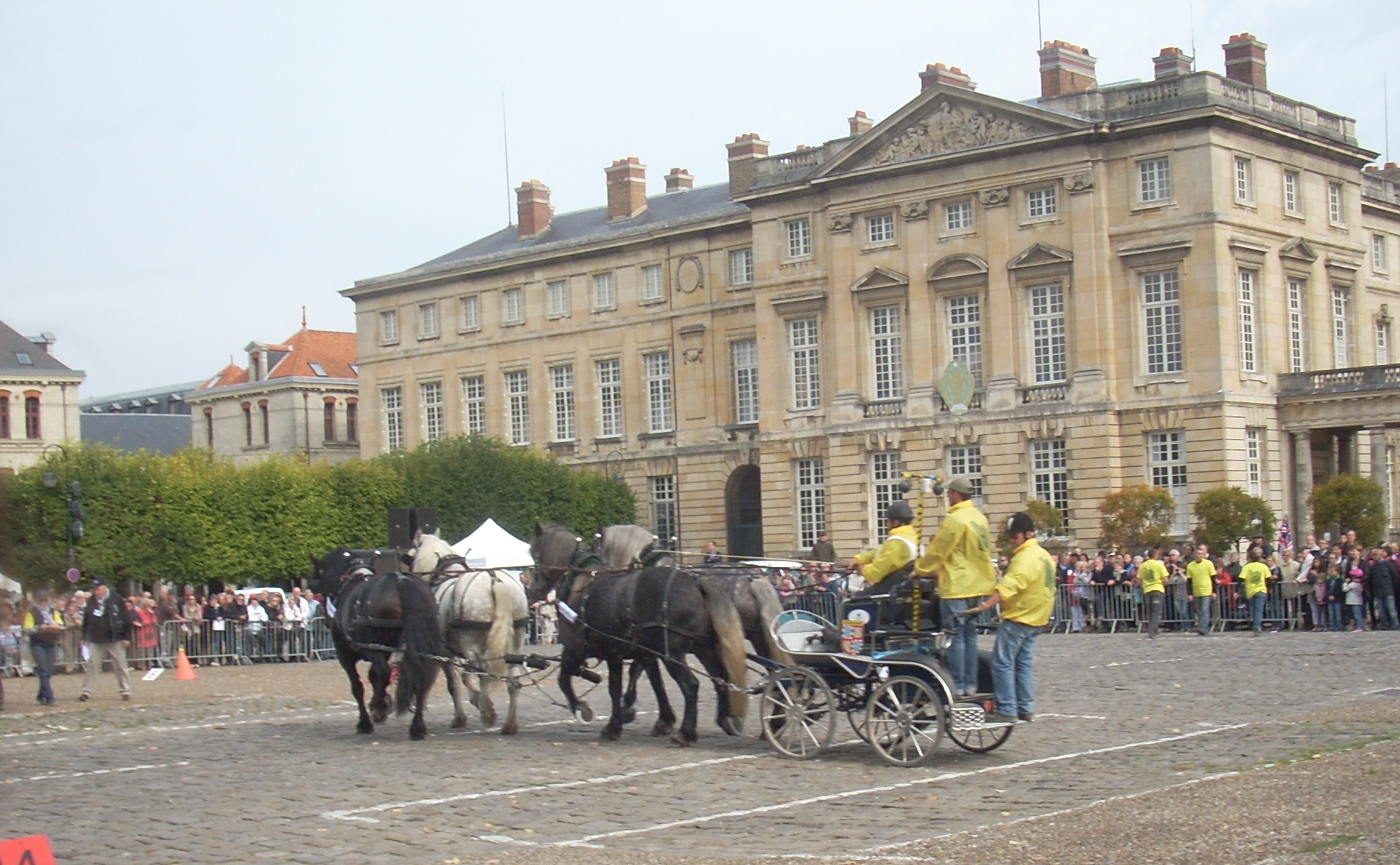 Tête d'une paire de Percherons attelés durant la route du Poisson 2012, à Lacroix-Saint-Ouen